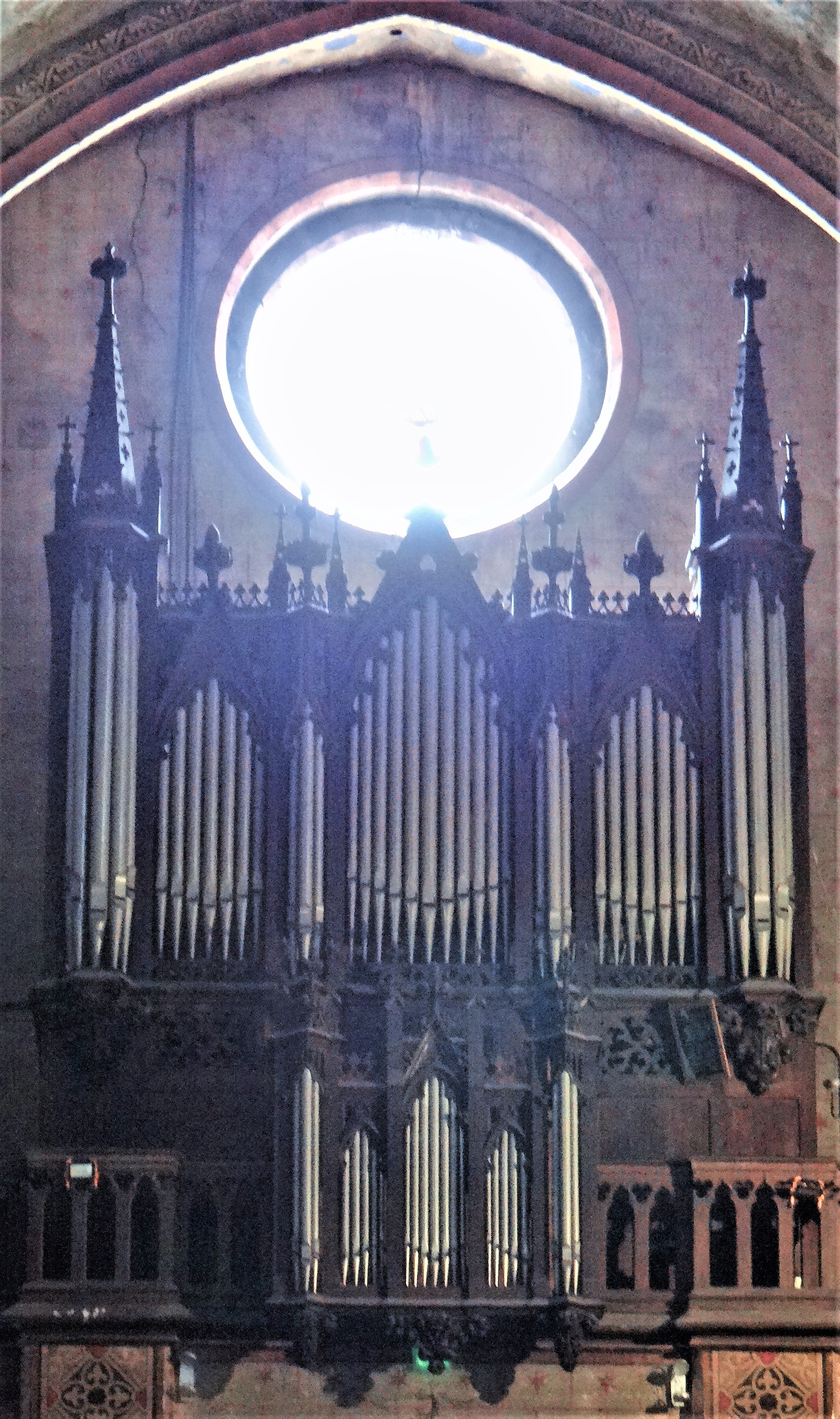 Lavaur - Église Saint-François - Orgue